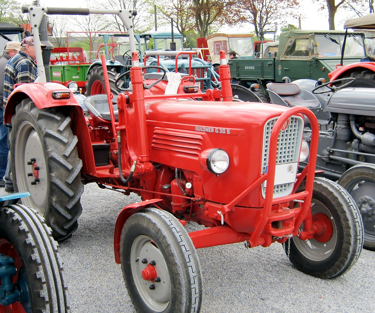 G30 mit Schnellgang, Frotbügel und Frontladerkonsole